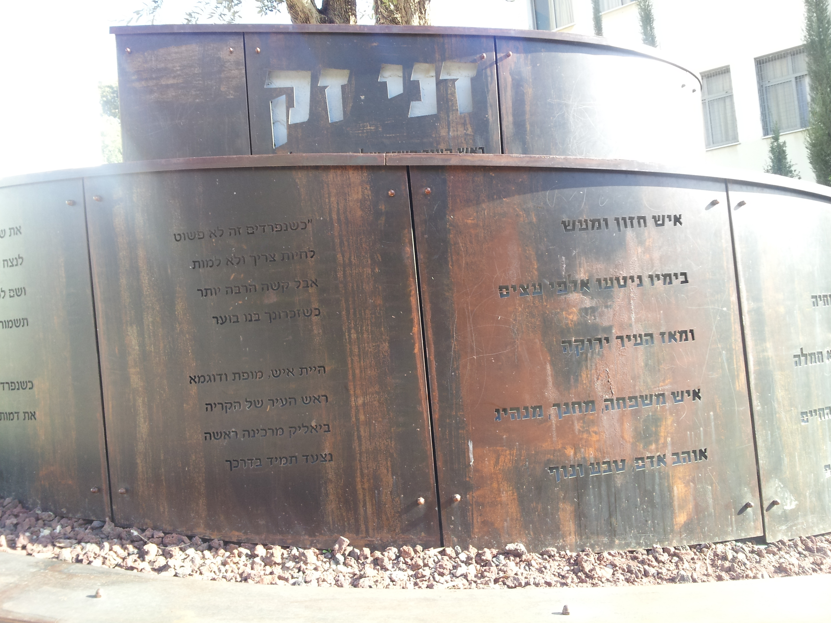 אנדרטה לזכר דני זק